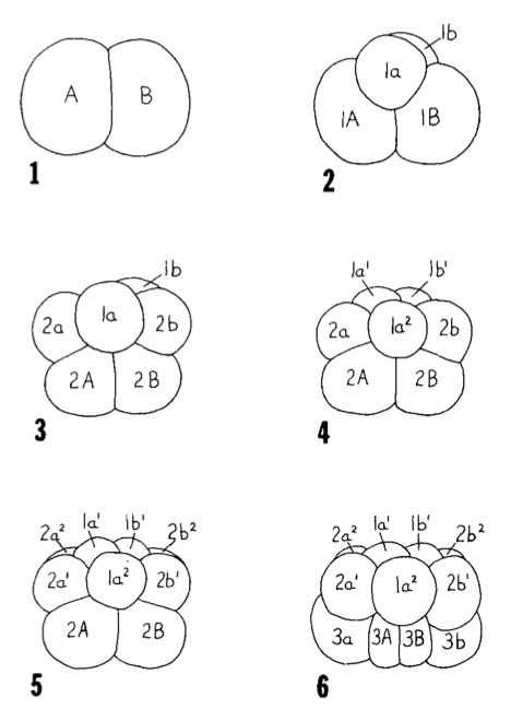 Figure 1: différentes